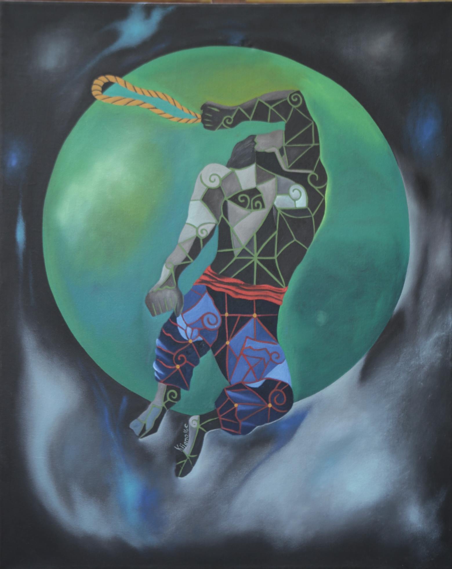 Запускаю сгусток моего тела в воздух, побеждаю невесомость и как флагеллант бичую мою душу, тело и мысль, только чтобы забыть тебя. В честь Барбары Морган», Собрание художника, Куэрнавака